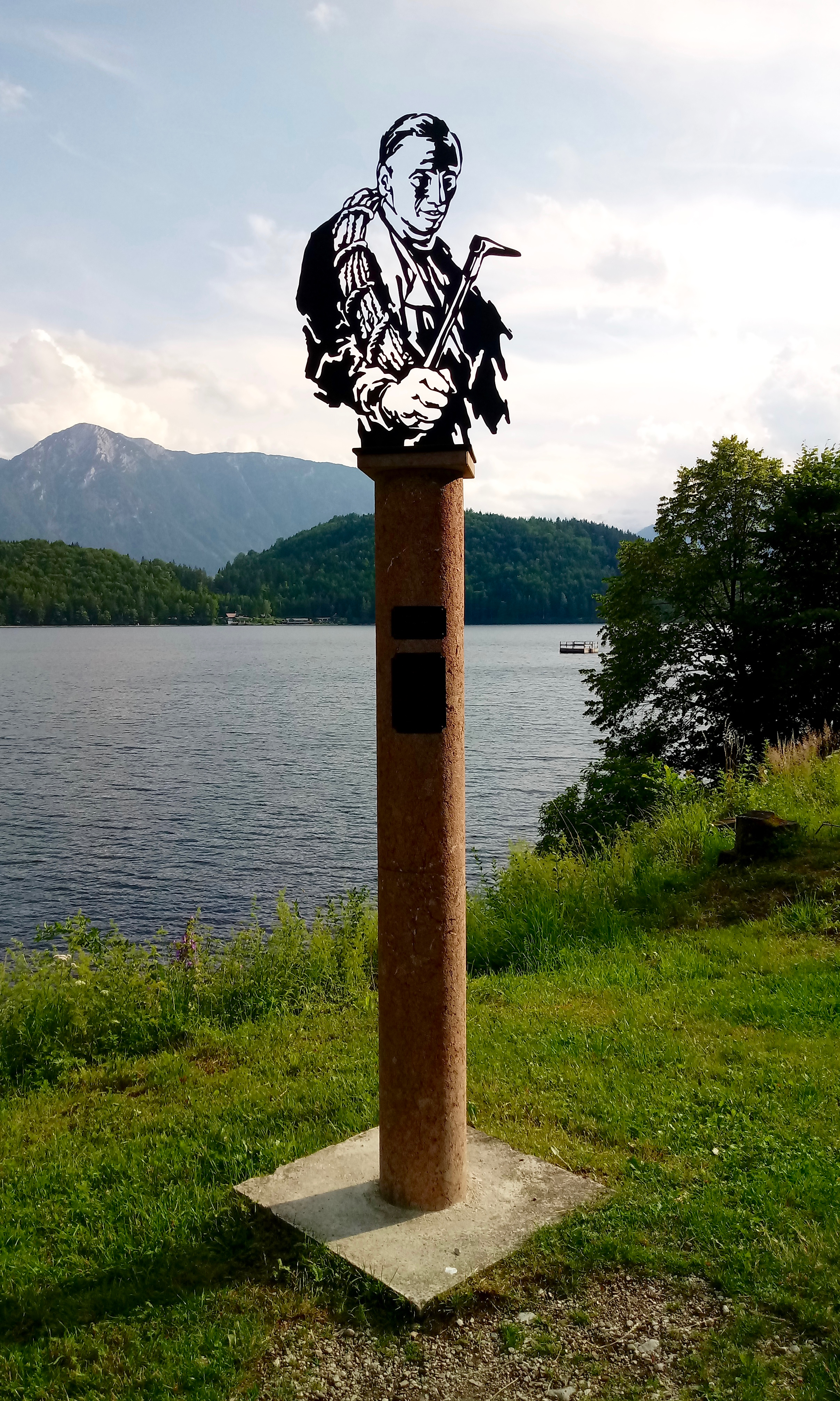 Paul-Preuss-Denkmal am Altausseer See.